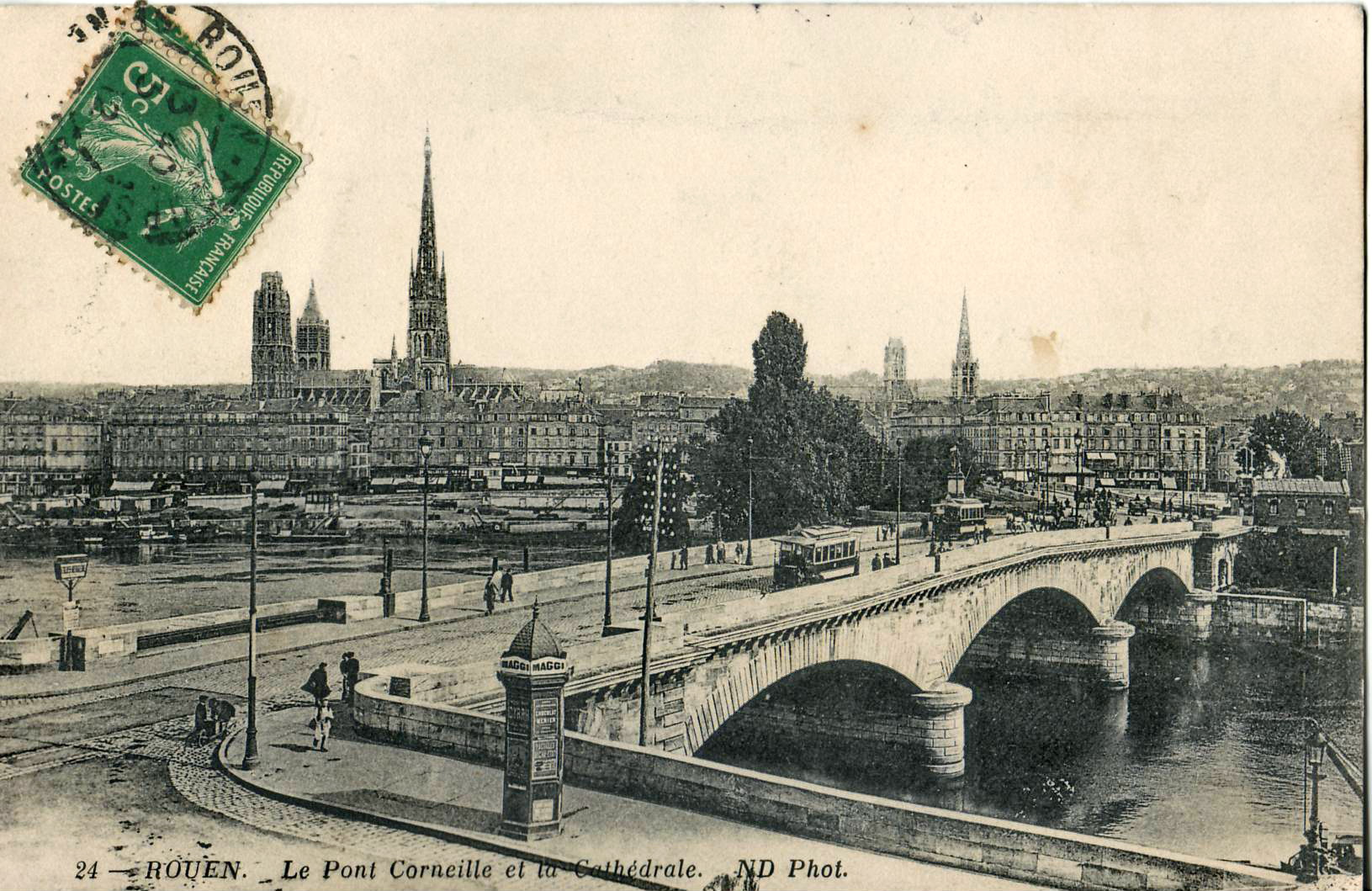 Carte postale ancienne éditée par ND, n°24 :ROUEN - Le Pont Corneille et la Cathédrale